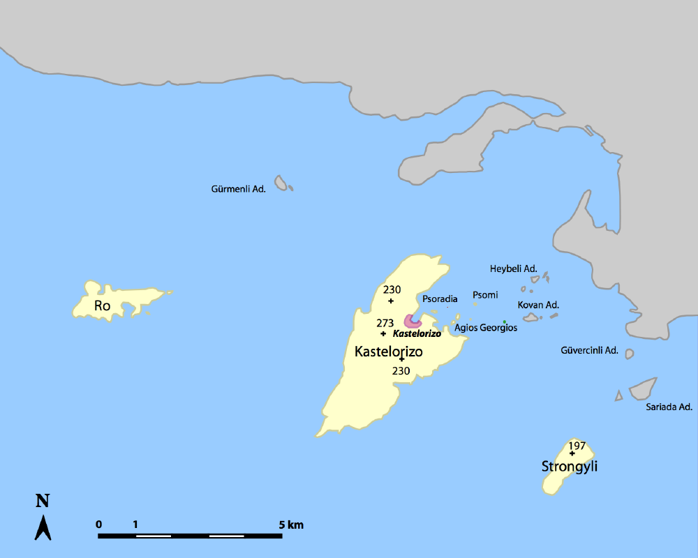 Megisti (Kastelorizo) municipality (Δήμος Μεγίστης), Dodecanese prefecture (Νομός Δωδεκανήσου), Greece